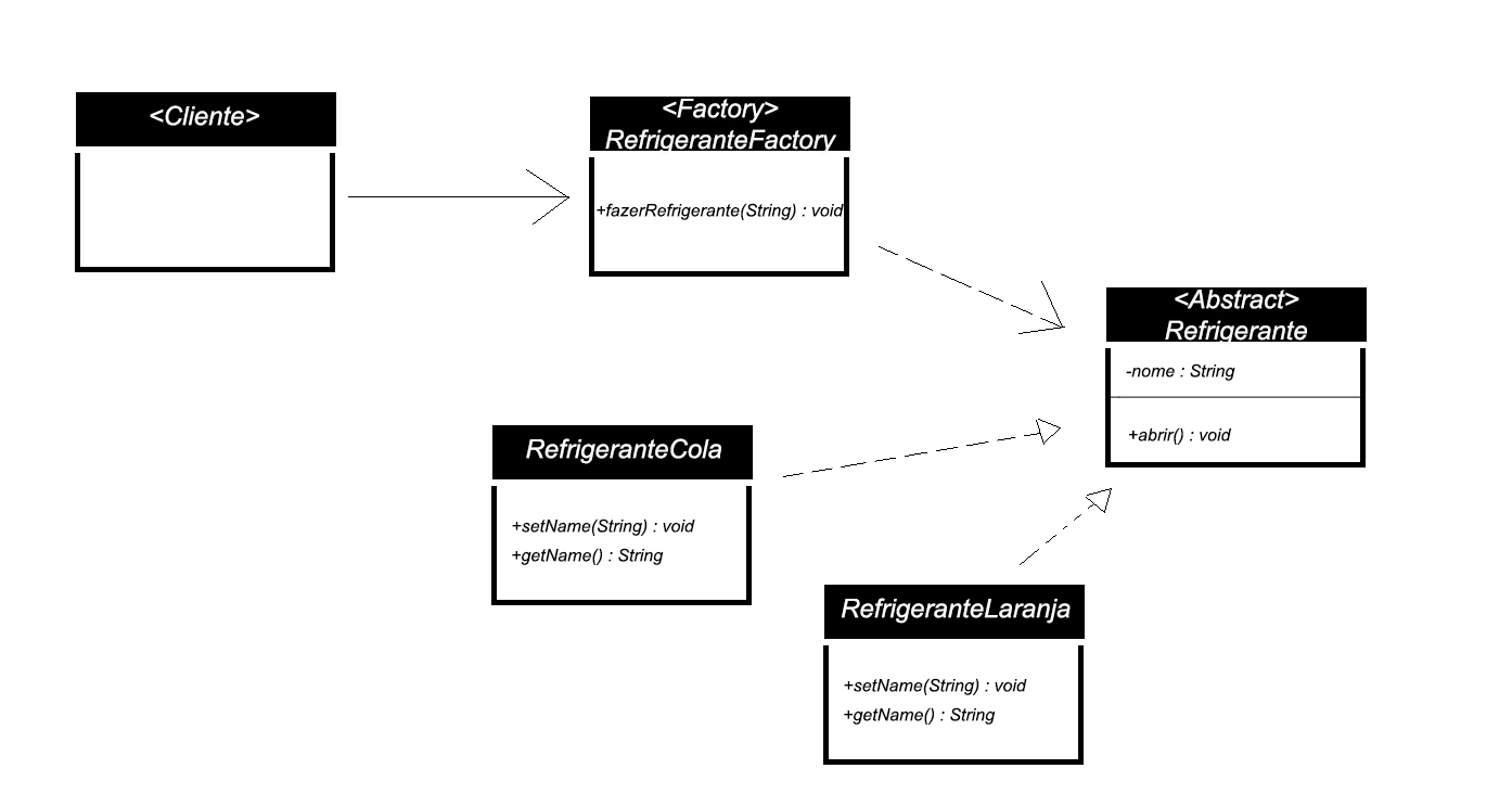 A imagem é uma ilustração de um padrão de criação GOF chamado de "Factory Method".